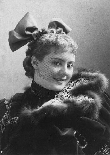 Cissy Fitzgerald.